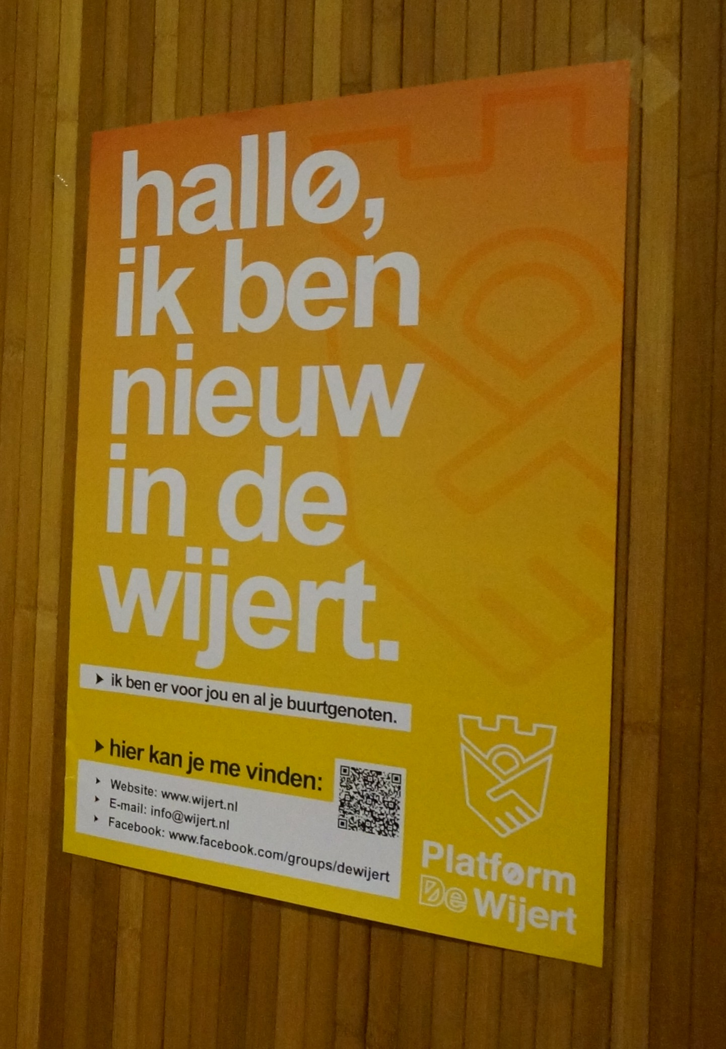 Platform De Wijert